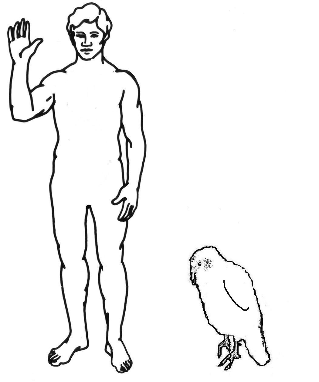 adult kakapo and man